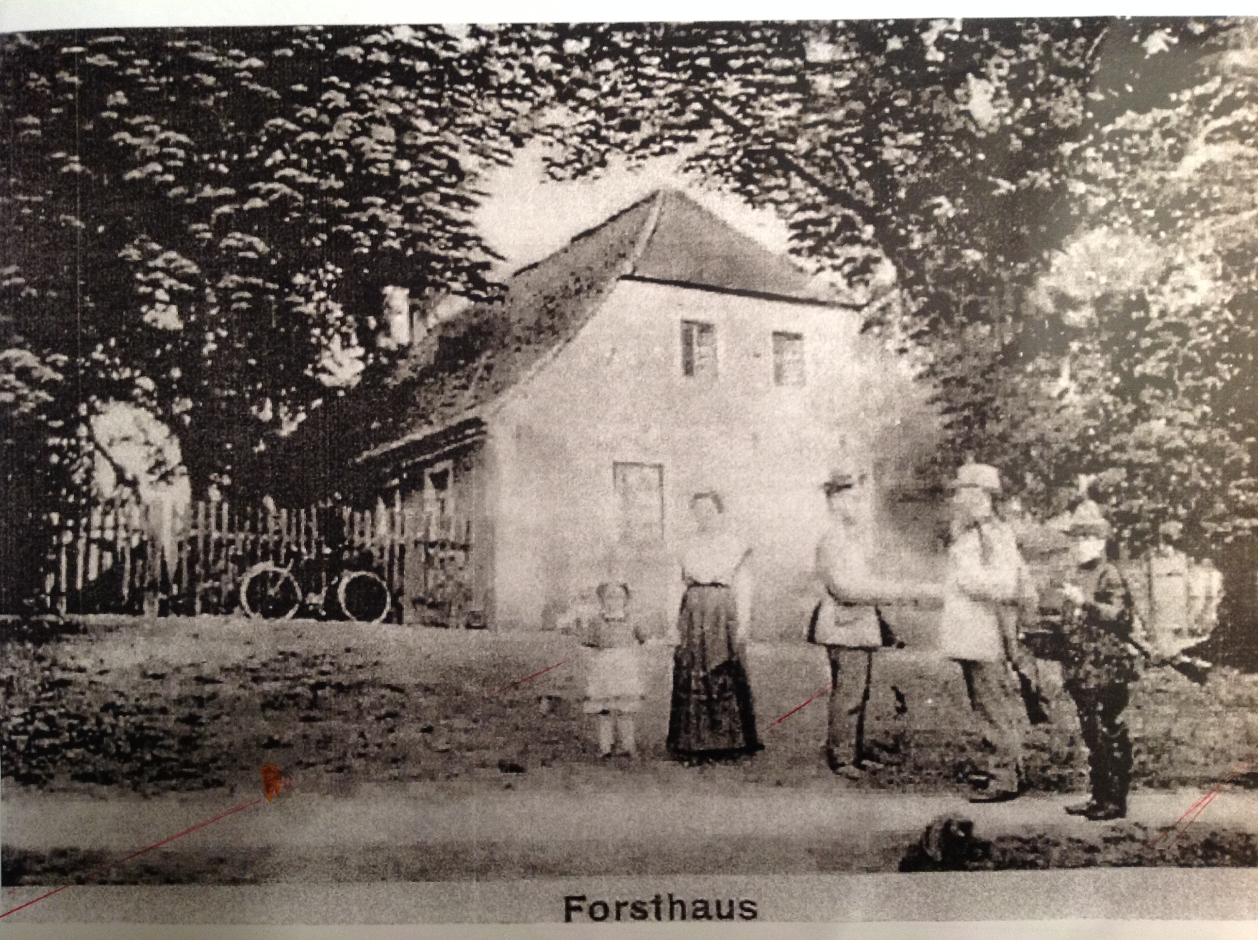 Leśniczówka która stała obok owczarni.